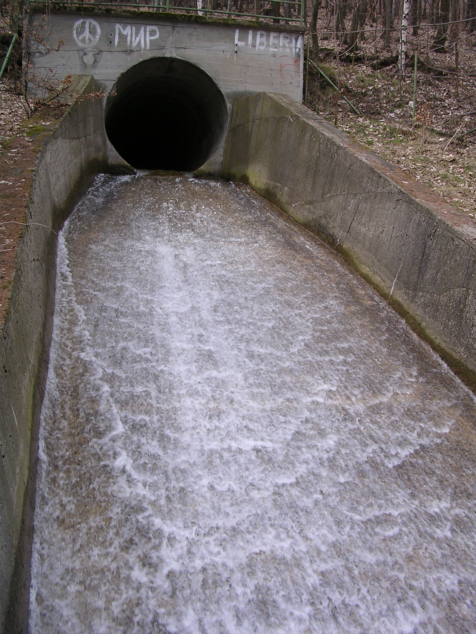 Albrechtická štola v Krušných horách, okres Most